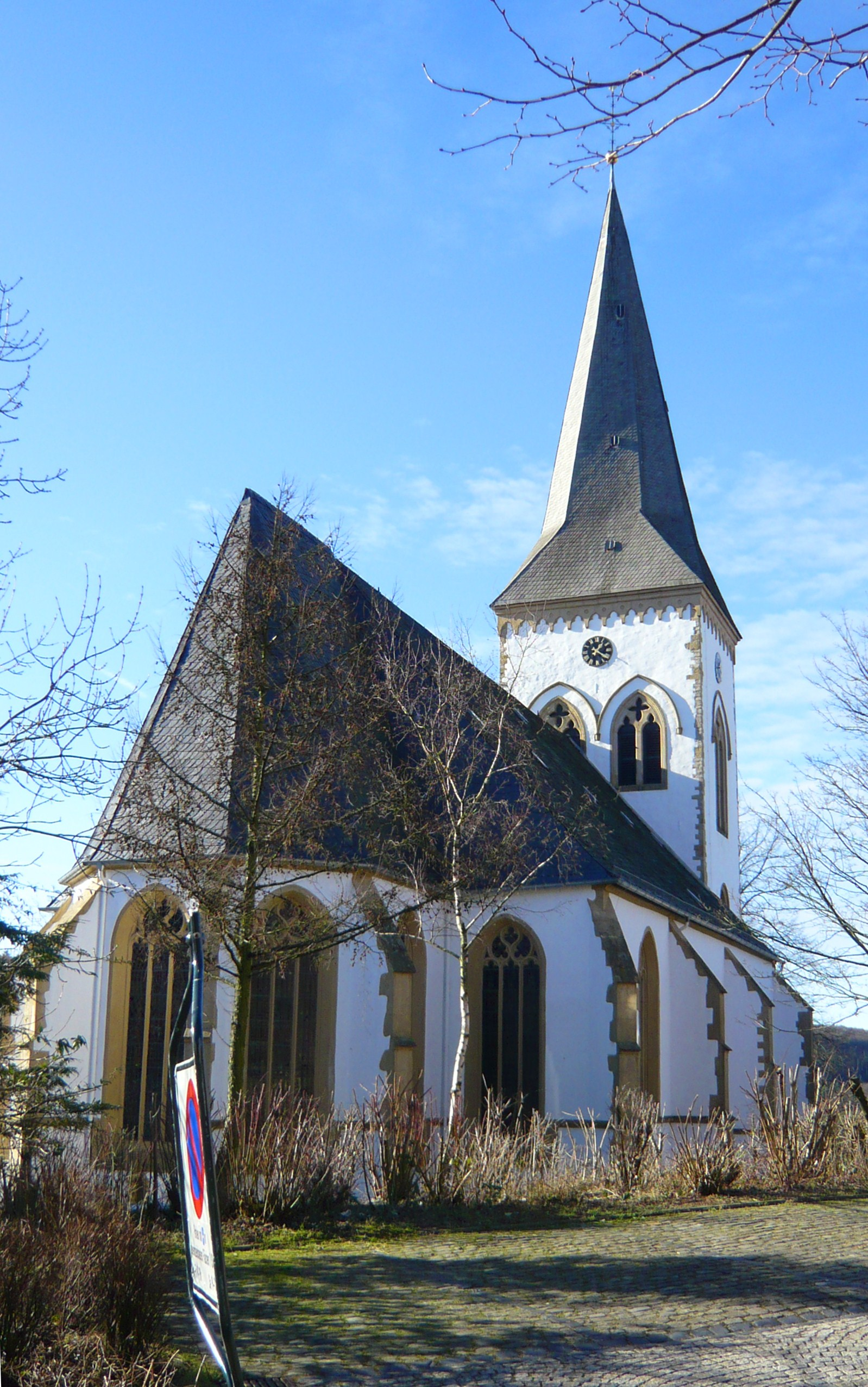 Alexanderkirche in Oerlinghausen, Germany This is a photograph of an architectural monument.